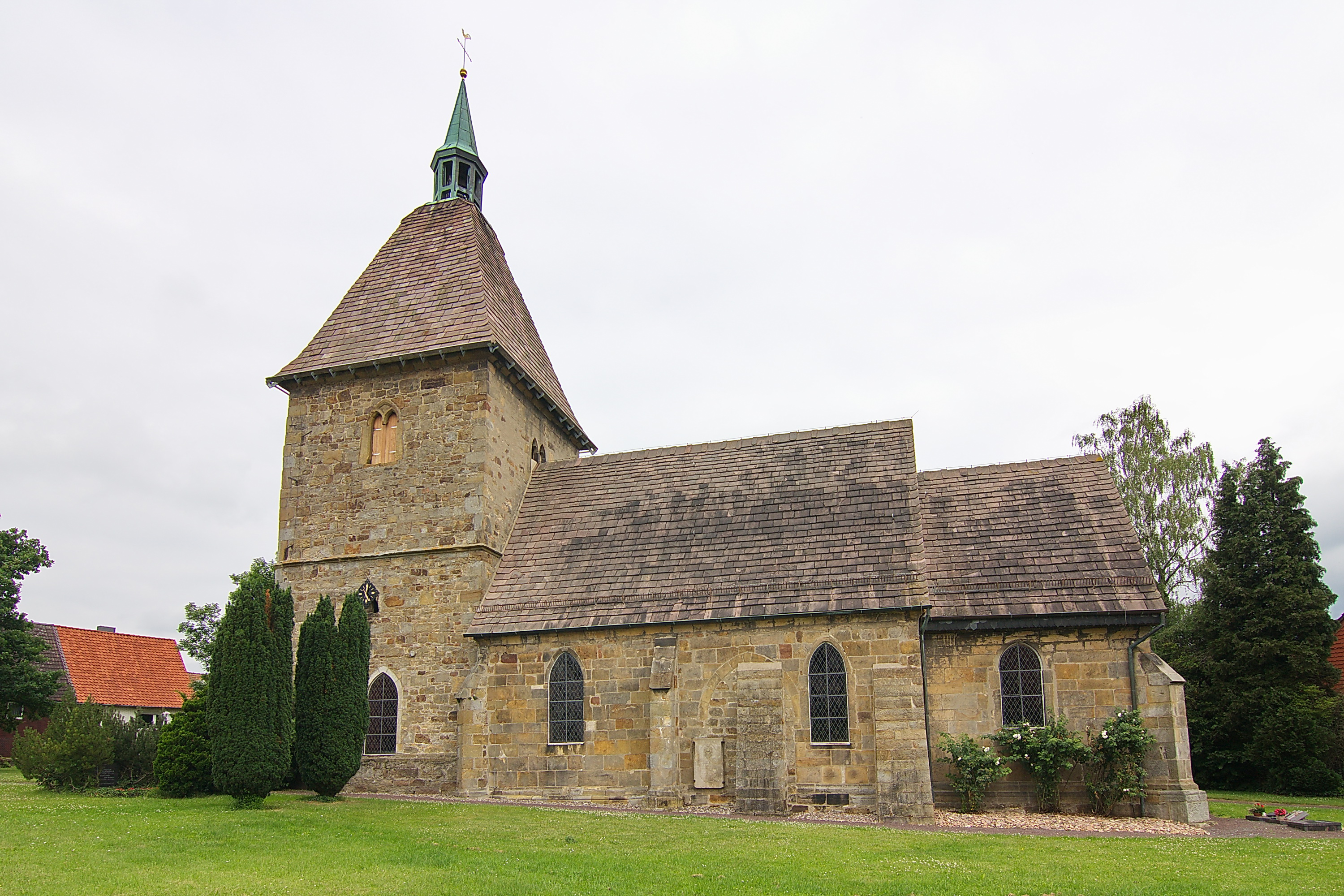 Pfarrkirche St. Ägidien, als Bruchsteinbau erbaut in der ersten Hälfte des 15. Jahrhunderts auf den Resten einer Vorgängerkirche von 1200.